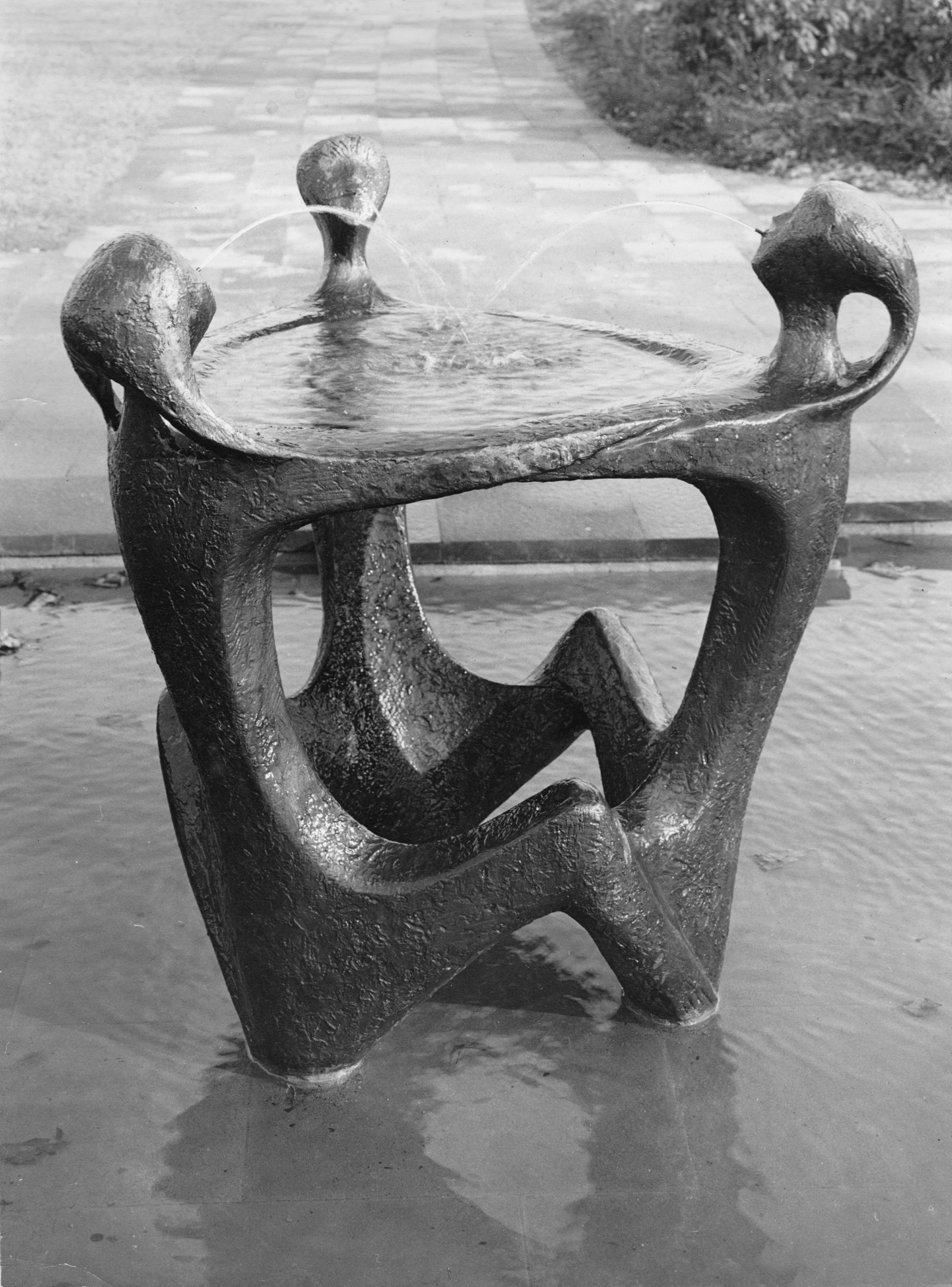 Brunnen von Hans Breker von 1965 in Duisburg-Eickelkamp